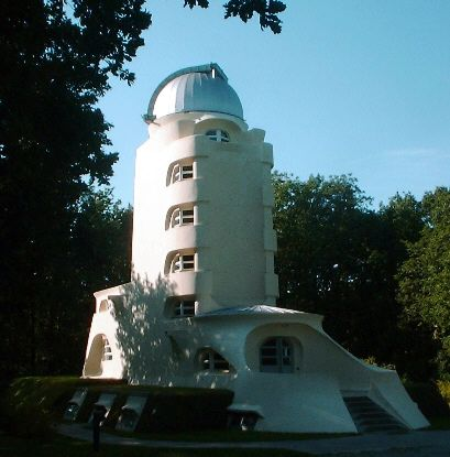 Einsteinturm auf dem Telegraphenberg Potsdam; Foto selbst erstellt: Acf 2004; Public Domain